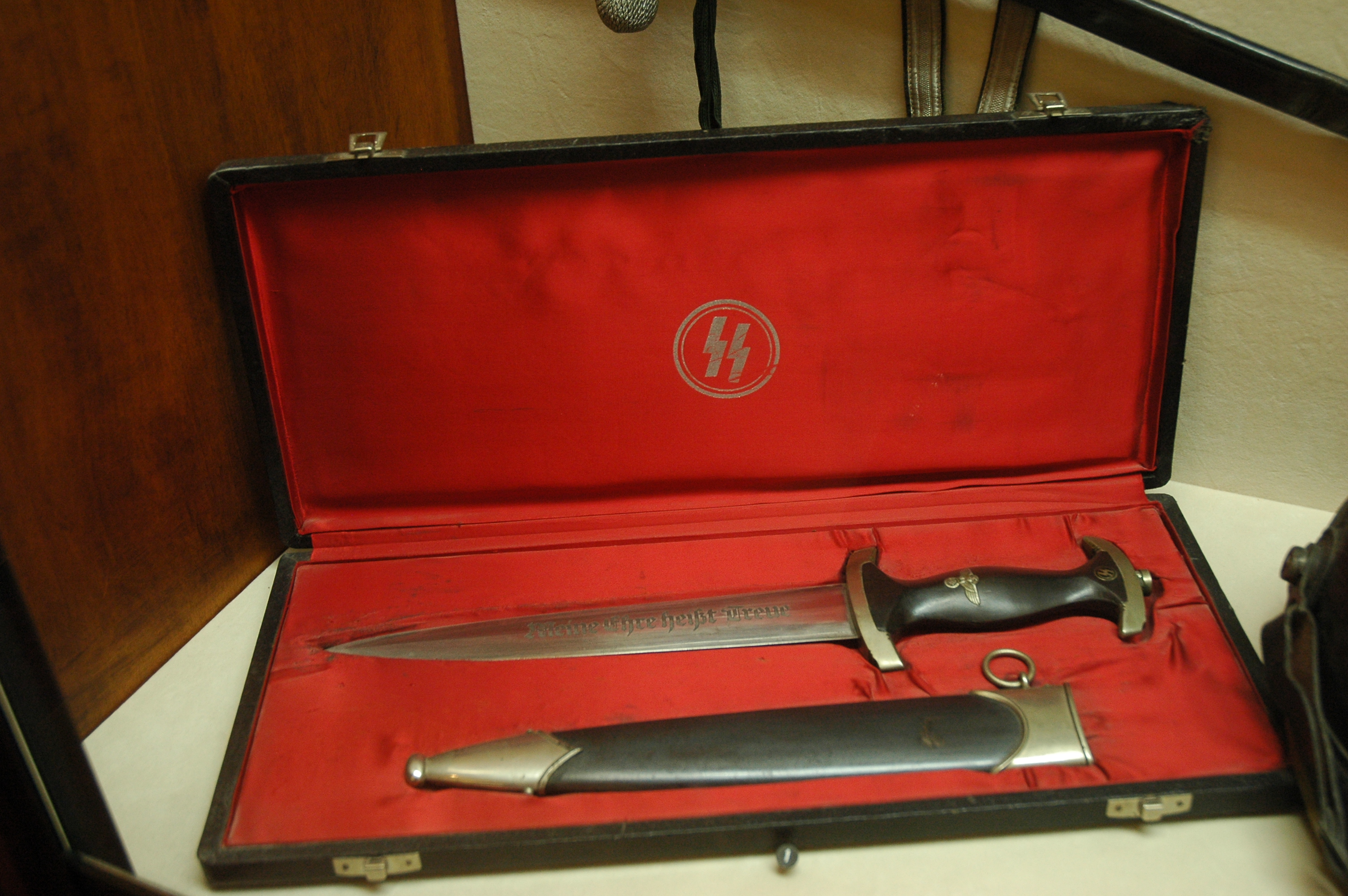 Dague allemande ornée du symbole des SS.